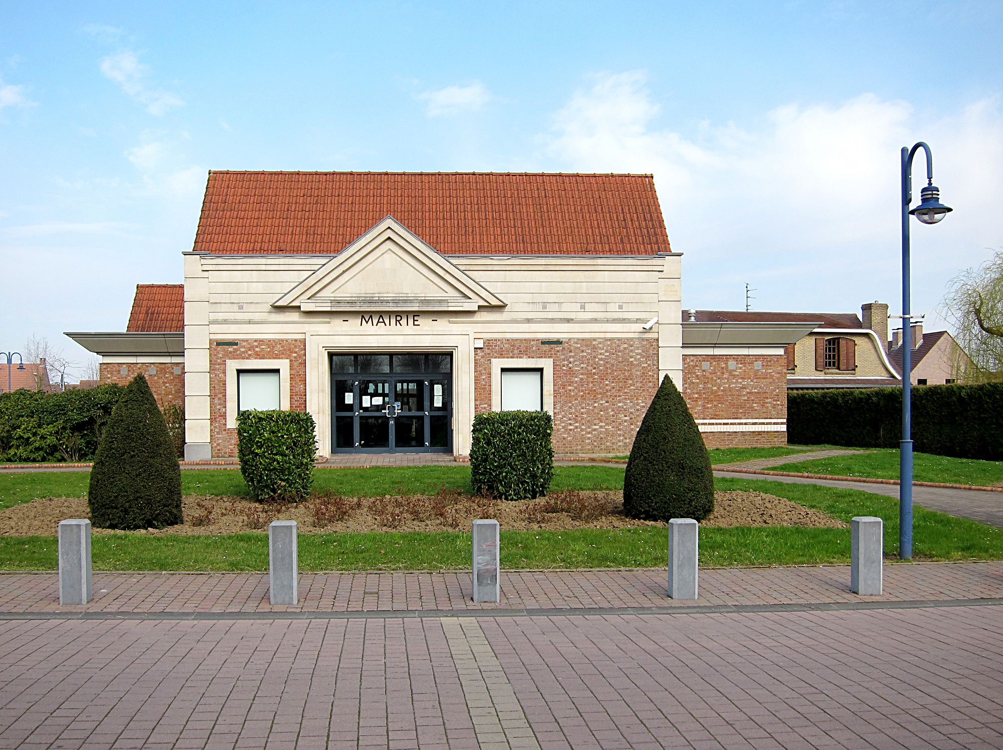 La mairie de Lompret (Nord).